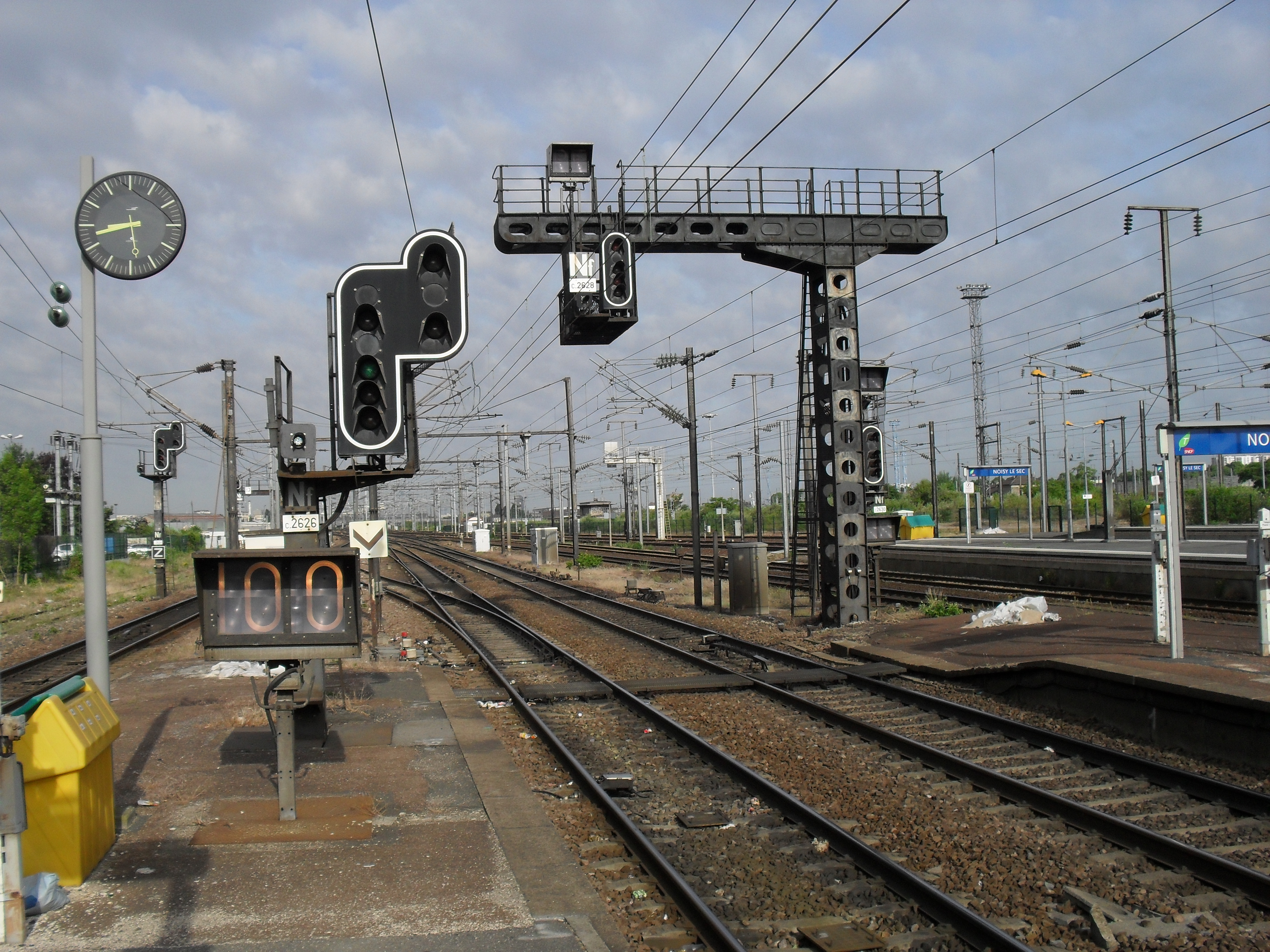 RER E - Gare de Noisy-le-Sec